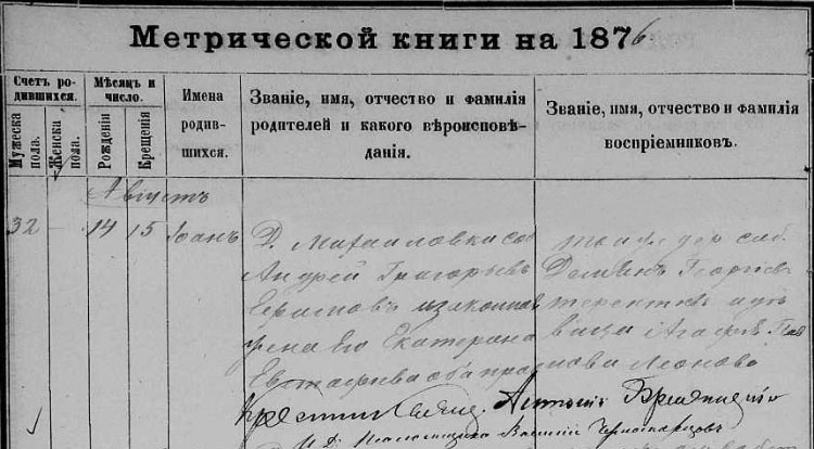 Запис в метричній книзі